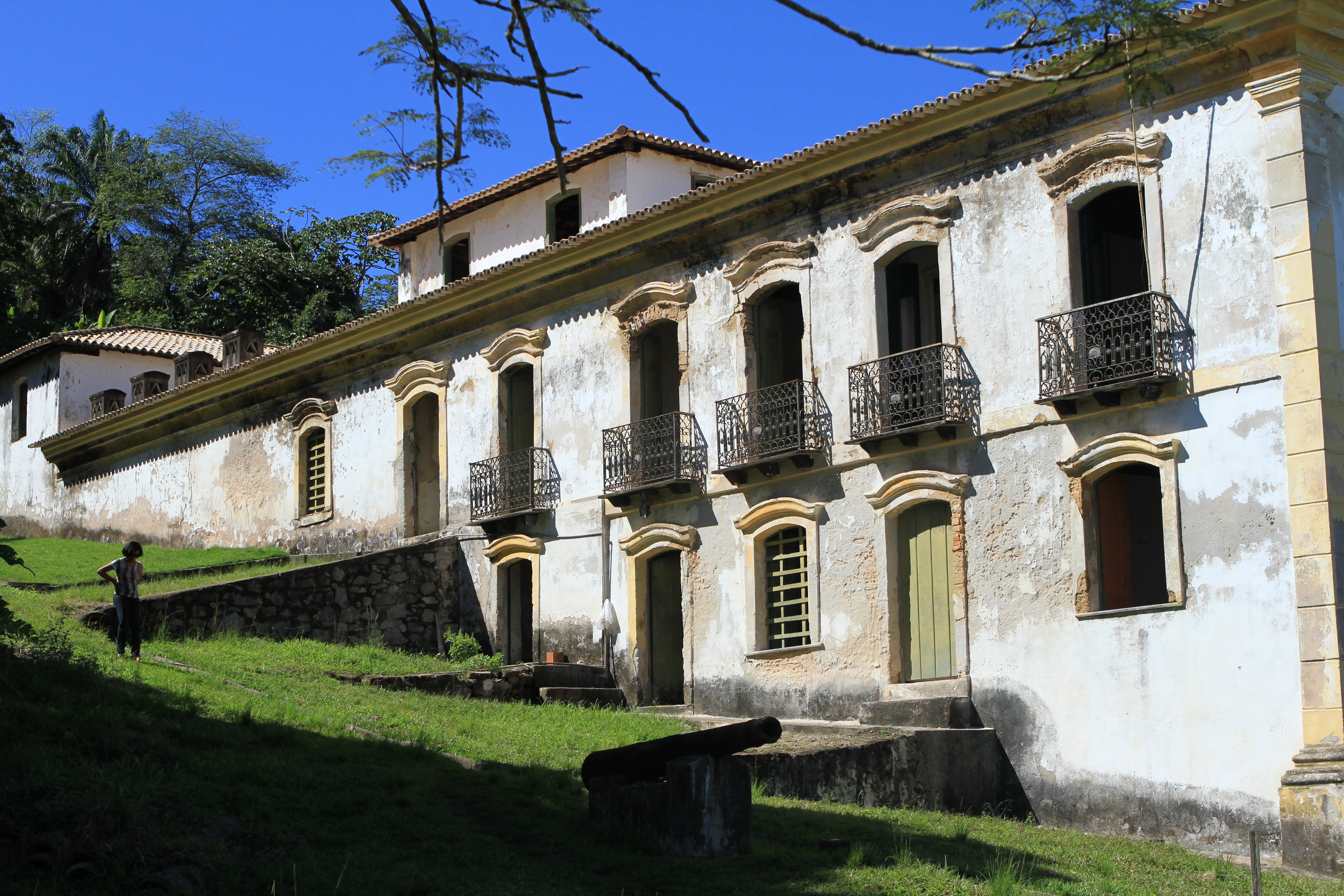 Caboto. Foto- Tatiana Azeviche (12)